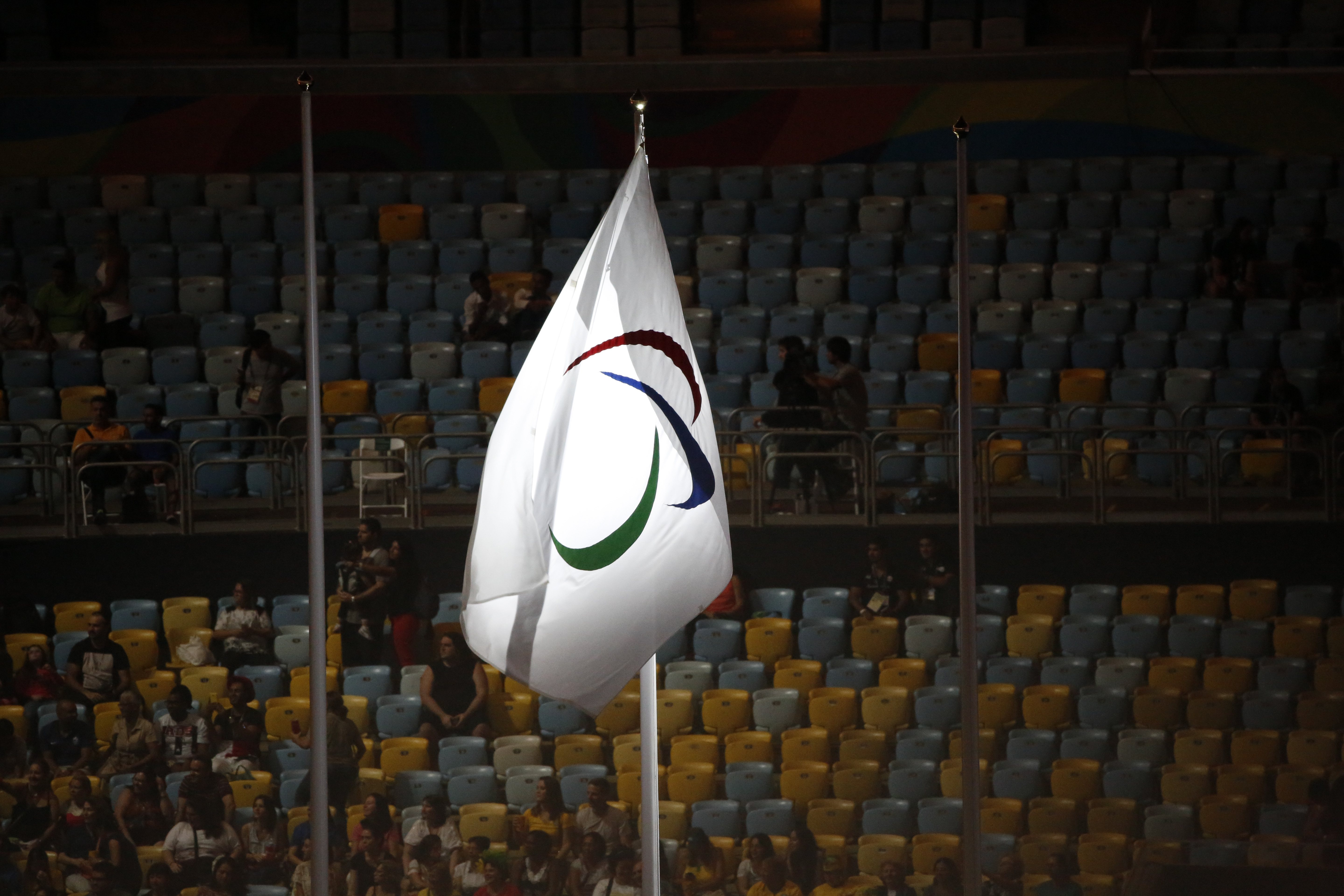 Rio de Janeiro - Cerimônia de encerramento dos Jogos Paralímpicos no Estádio do Maracanã (Fernando Frazão/Agência Brasil)